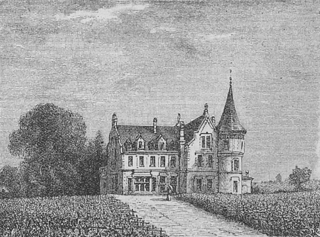 Illustration du Château Lascombes dans l'ouvrage Bordeaux et ses vins (6ème édition) de Charles Cocks et Edouard Féret publié en 1893